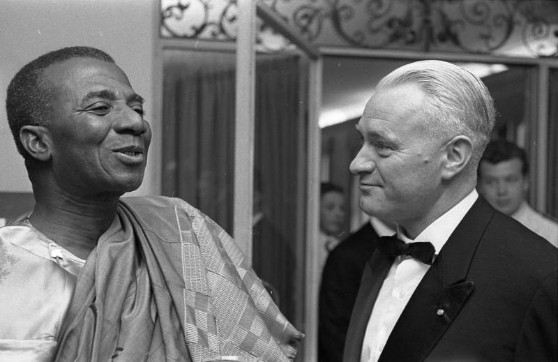 Staatspräsident von Togo, Olympio, Empfang im Hotel "Continental" in München